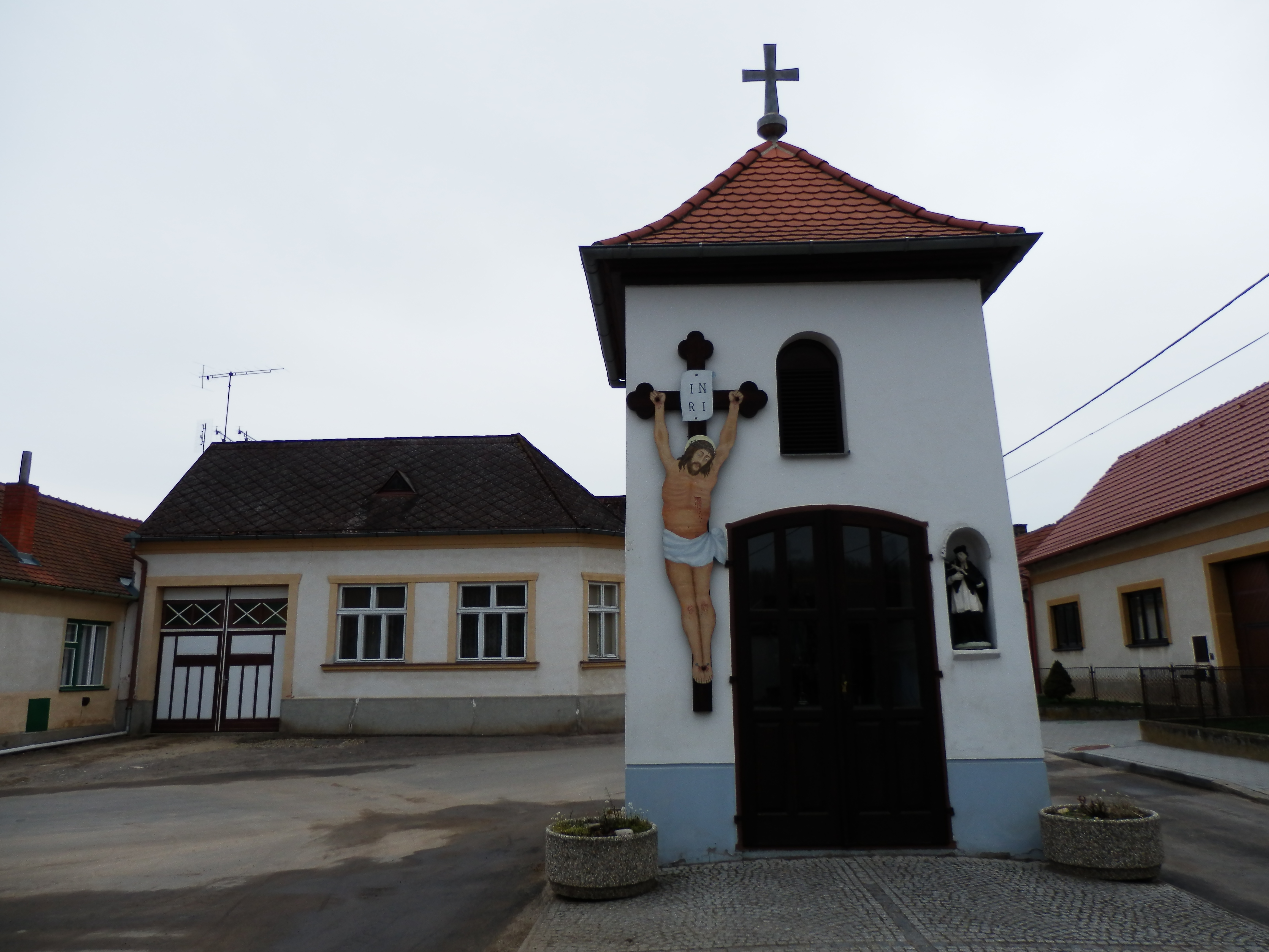 Zvonice, náves, Výrovice.